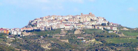 Panorama.